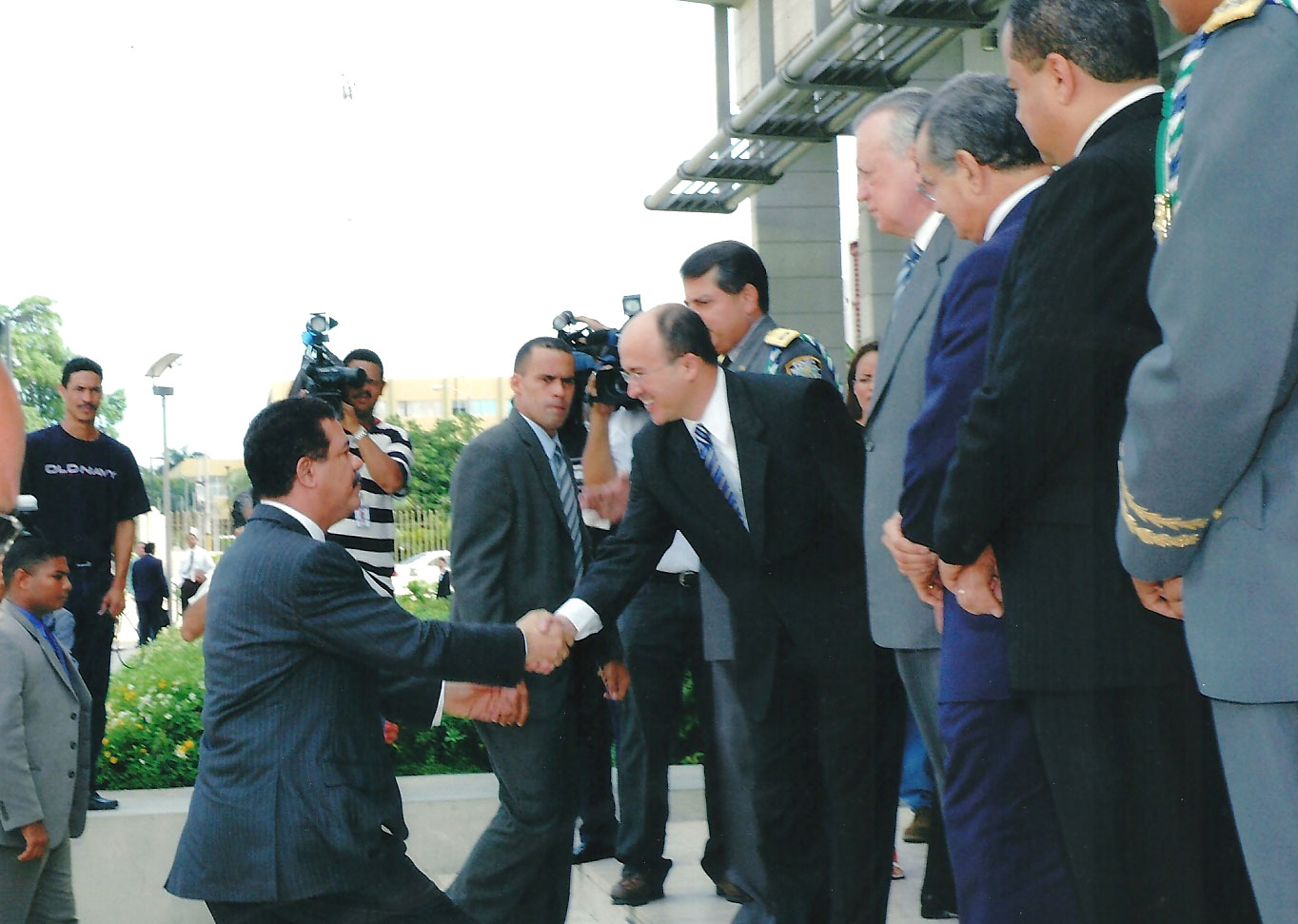 Francisco Domínguez Brito recibe a Leonel Fernández en la inauguración del Palacio de Justicia de Santo Domingo, 5 de enero de 2005.